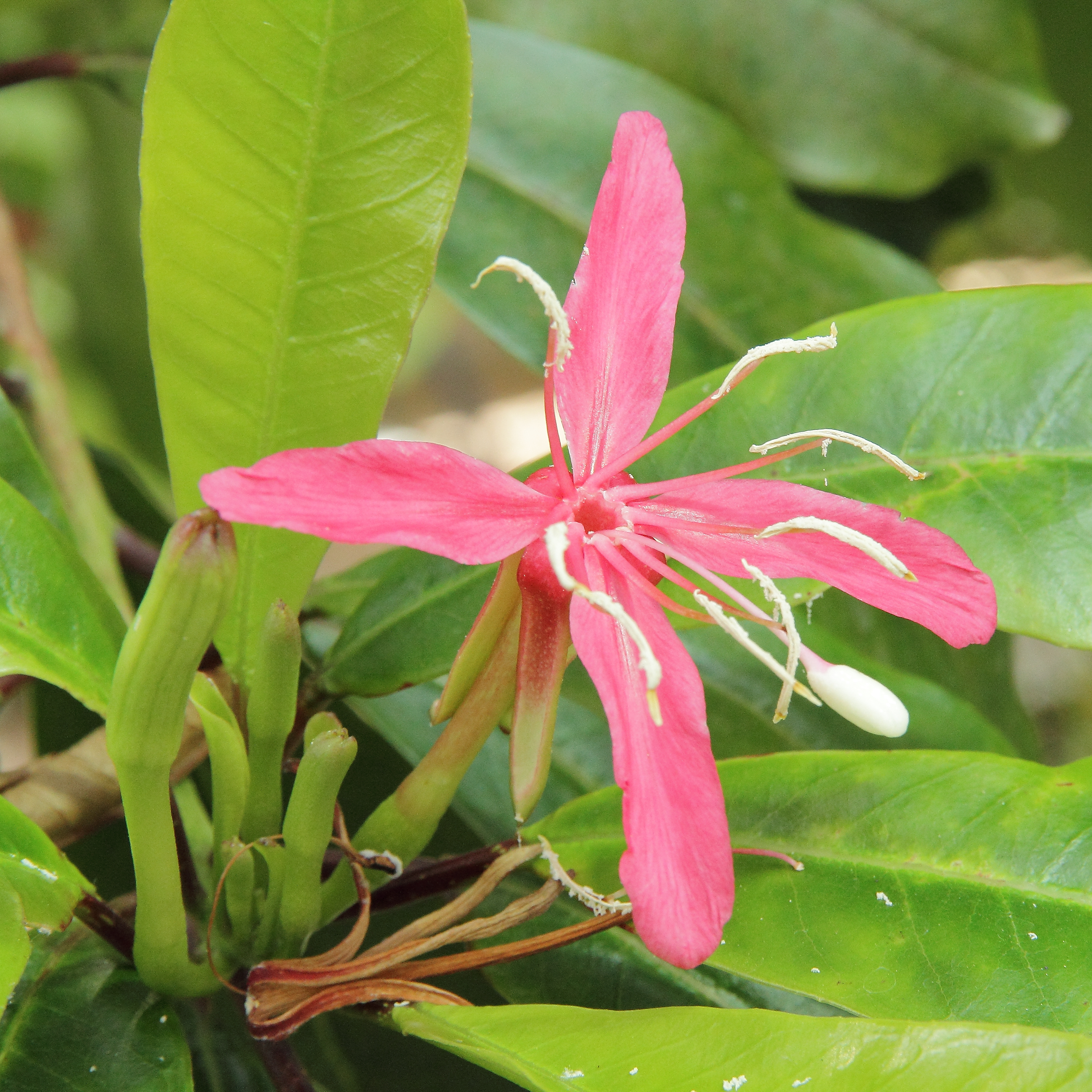 Hauya heydeana i Göteborgs Botaniska Trädgård.